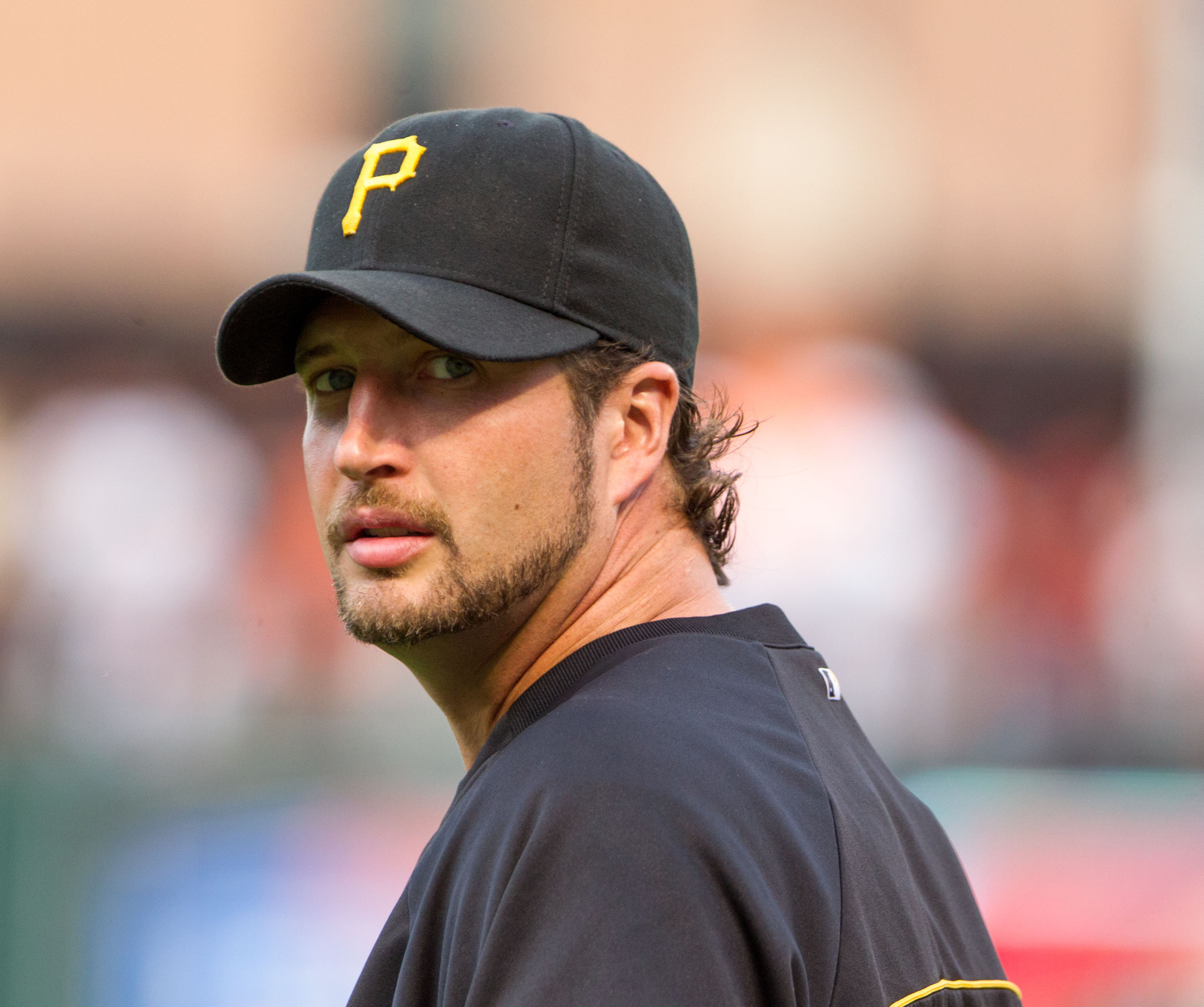 Pirates at Orioles June 14, 2012